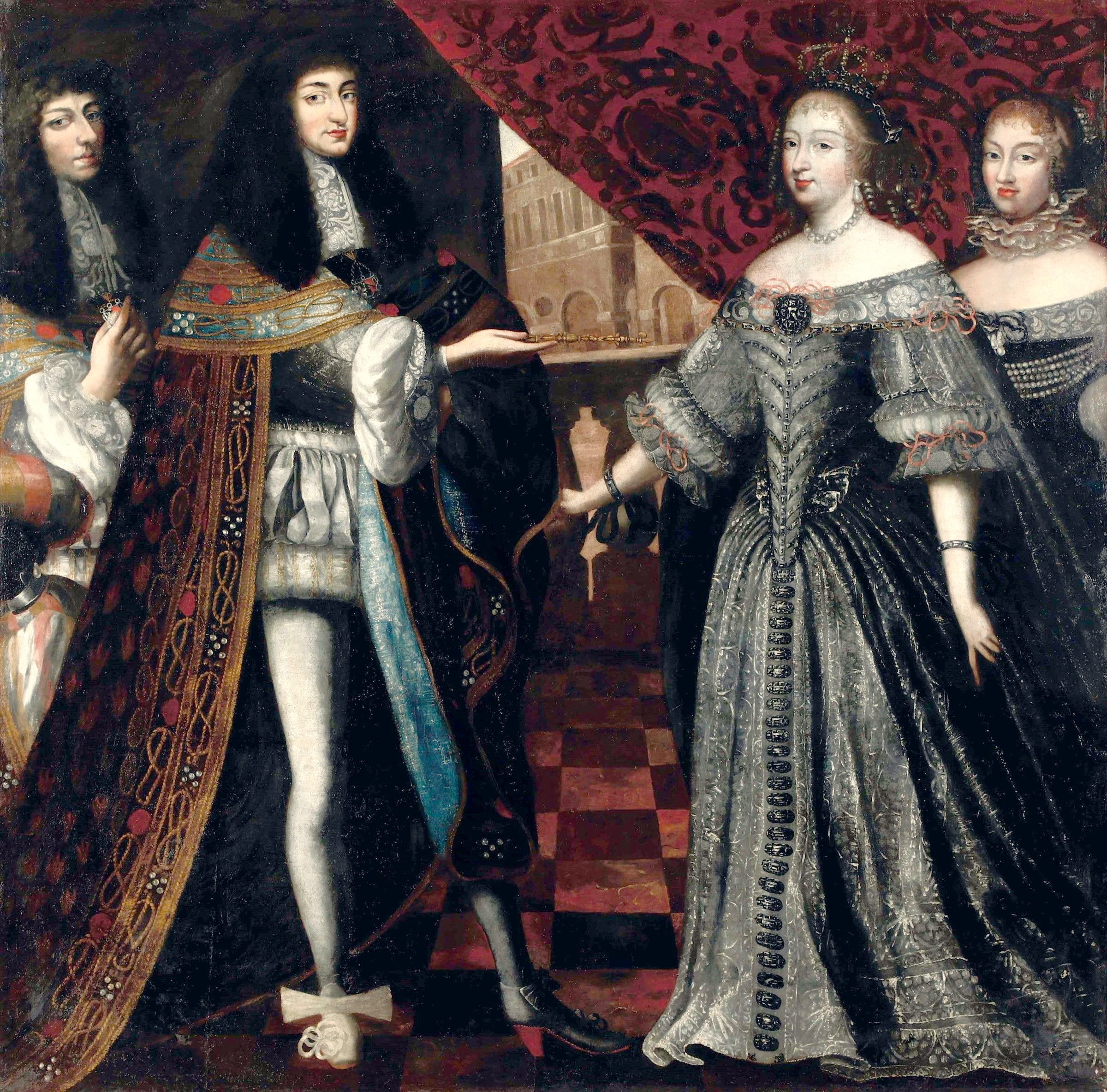 nozze di Carlo Emanuele II di Savoia con Giovanna Battista di Savoia